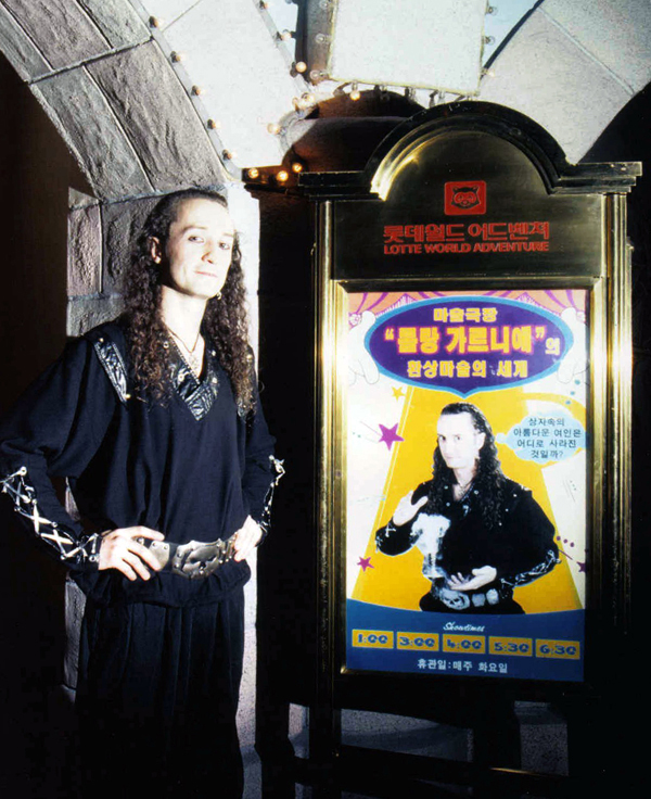 Devant le théàtre